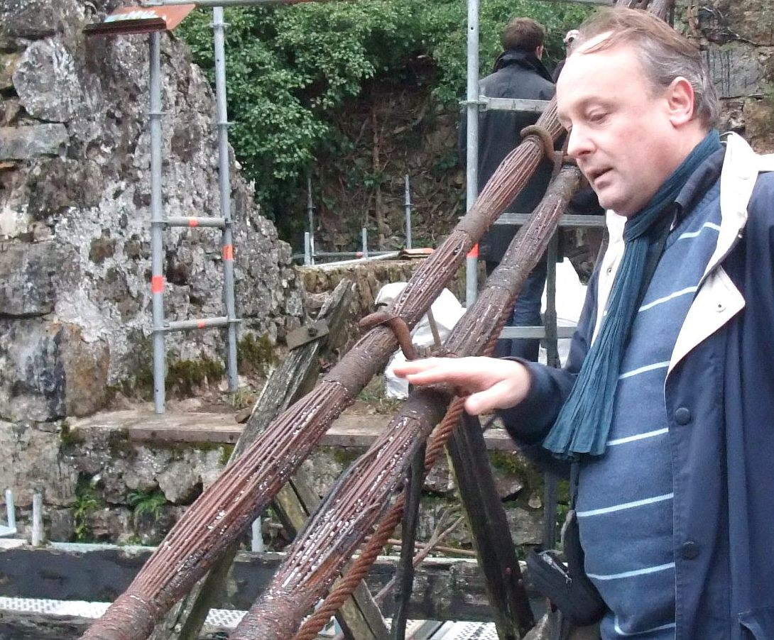 Pont de Moulin sur Cance câbles